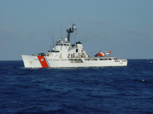 USCGC Venturous (WMEC-625)